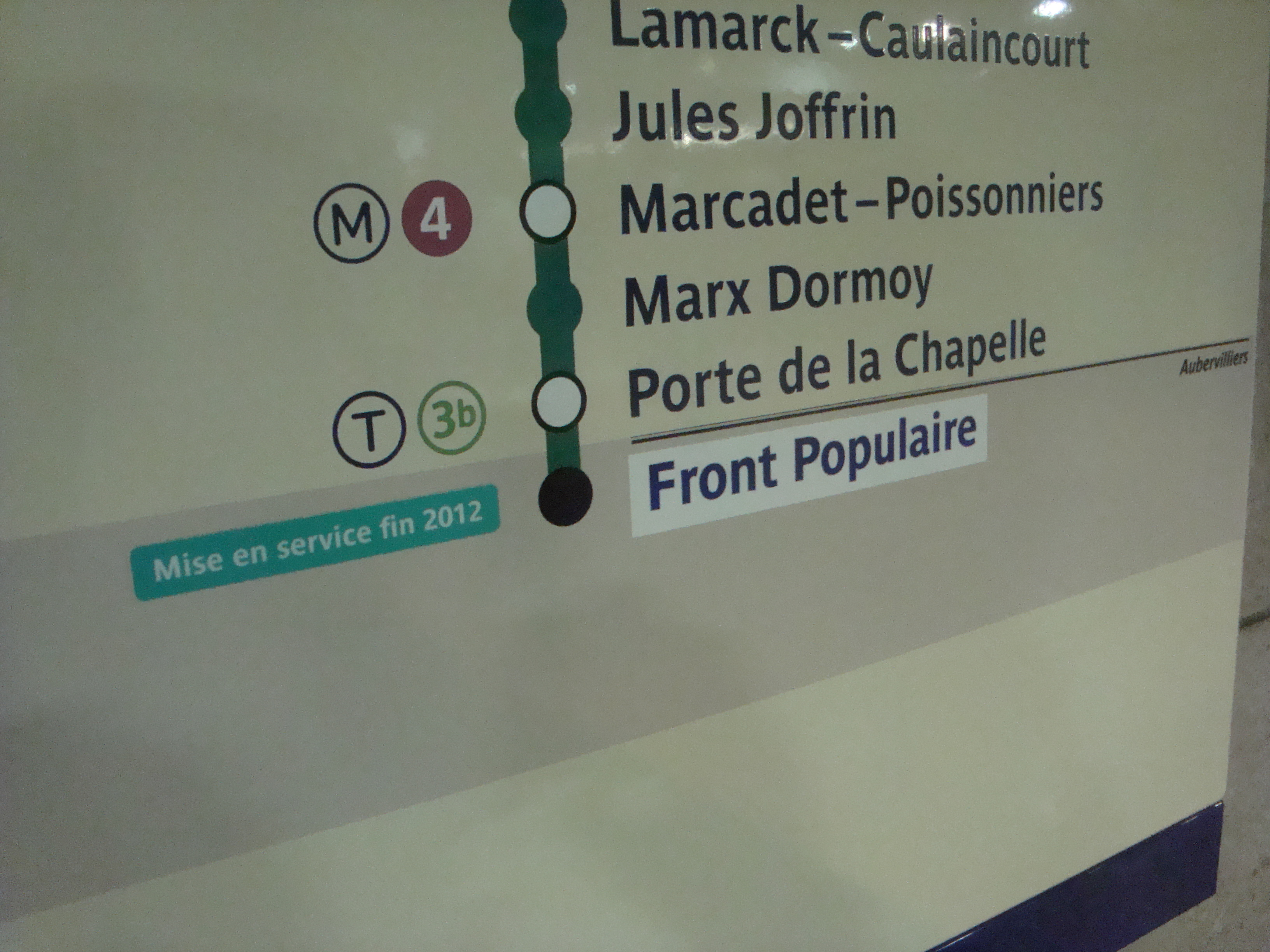 Détail du panneau de la liste des stations en direction du nord posé à la station Madeleine en août 2012, indiquant les futures stations.